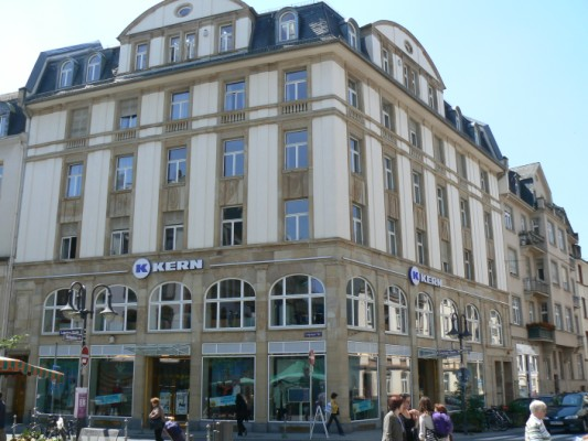 Frankfurt Bockenheim, ehemaliges Kaufhaus West Leipziger Straße/Kurfürstenstraße, ursprünglich Ksufhaus Wronker, Filiale Leipziger Straße, Frankfurt-Bockenheim